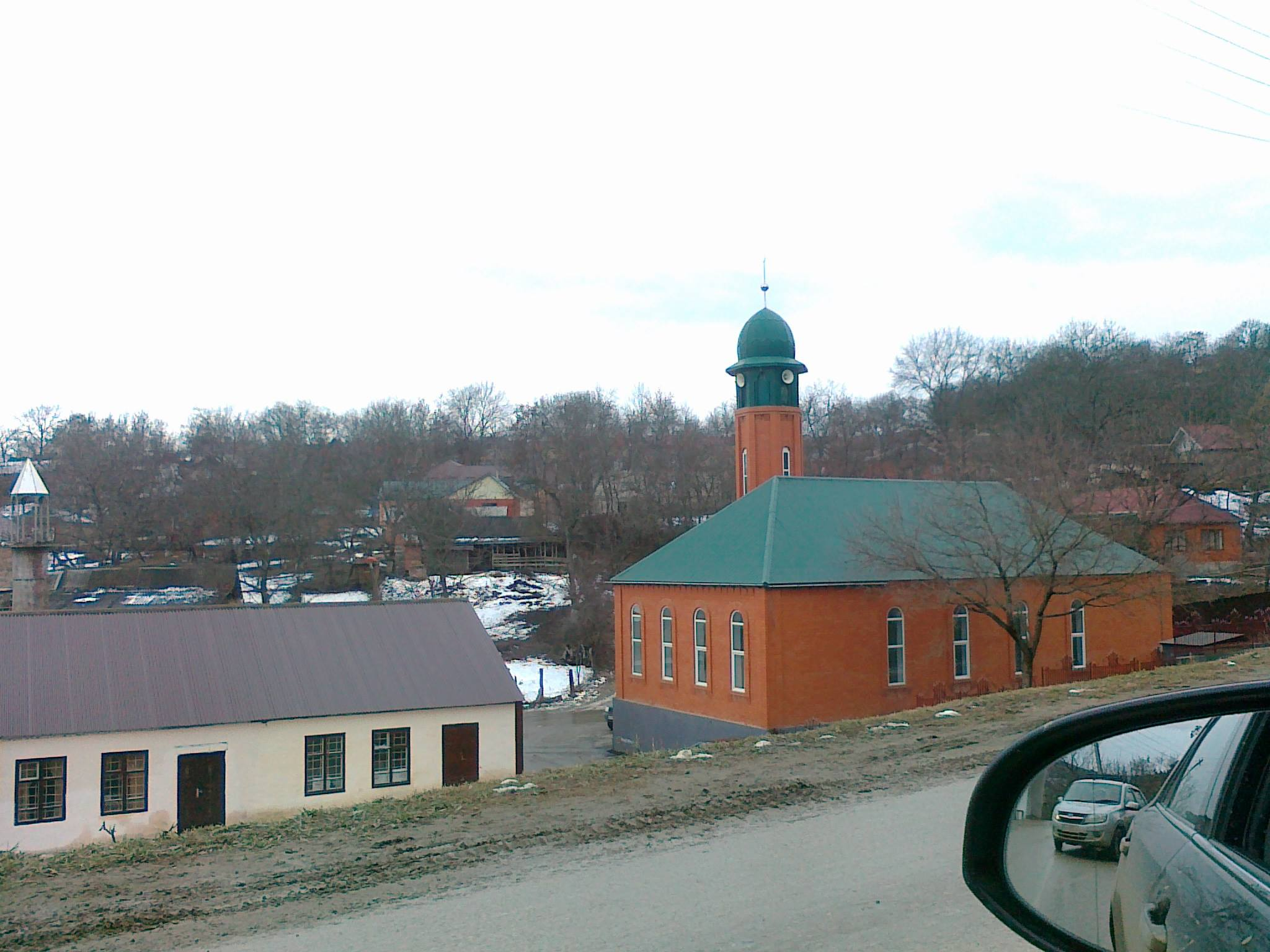 Нохчийн: НОХЧИЙН МОХК. Айти-Мохк